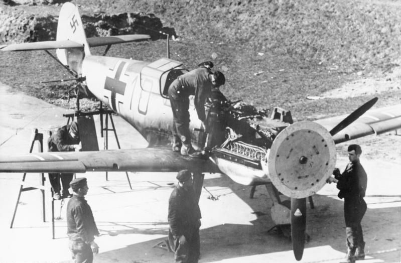 Auf dem Justierstand. Zur Kontrolle des durch den Propellerkreis schießenden MG wird eine [Holz-] Scheibe an den Propellerflügel angebracht, an der dann die Einschüsse zu sehen sind.